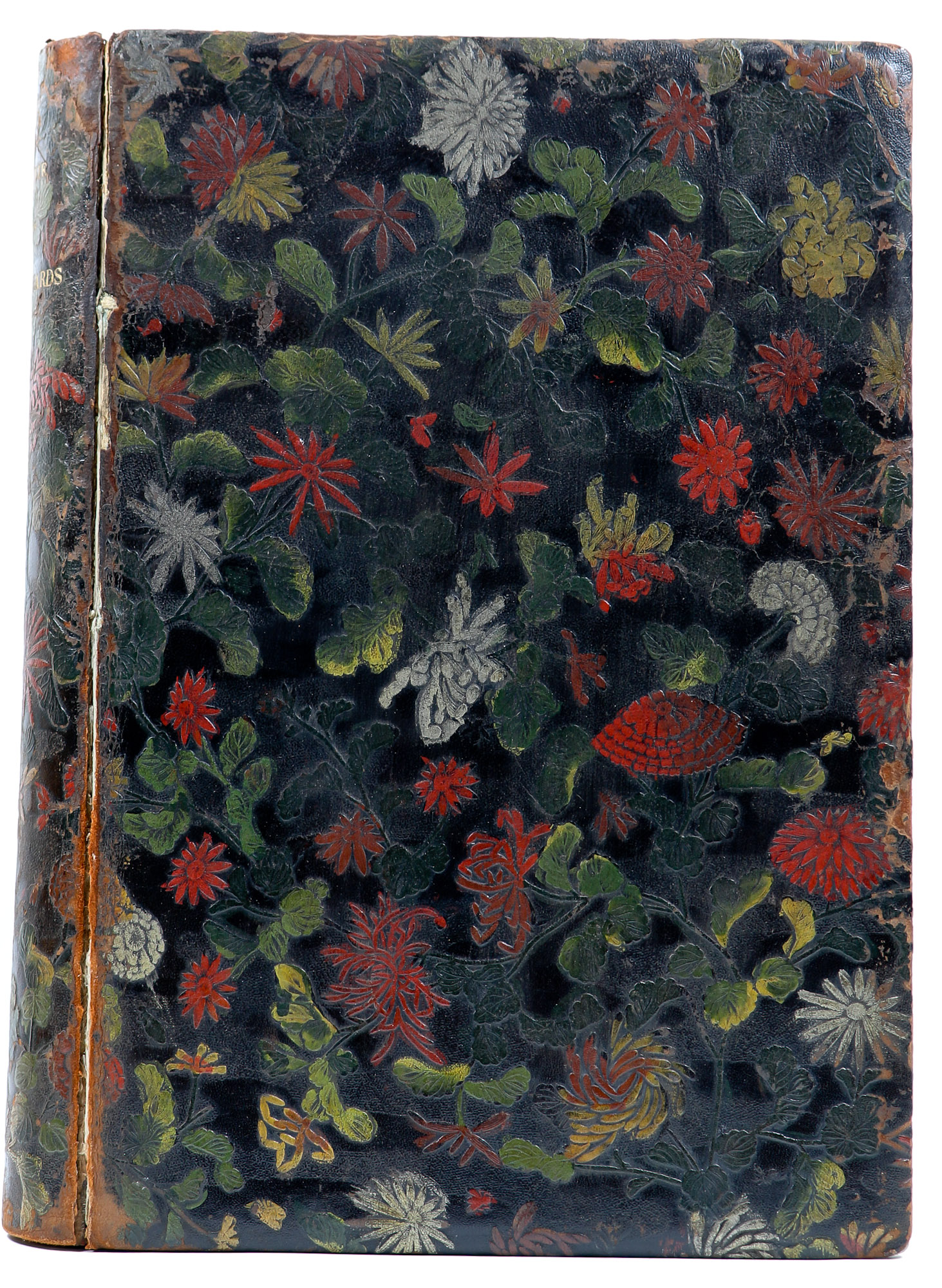 Reliure de René Wiener. BmN : cote 201 501